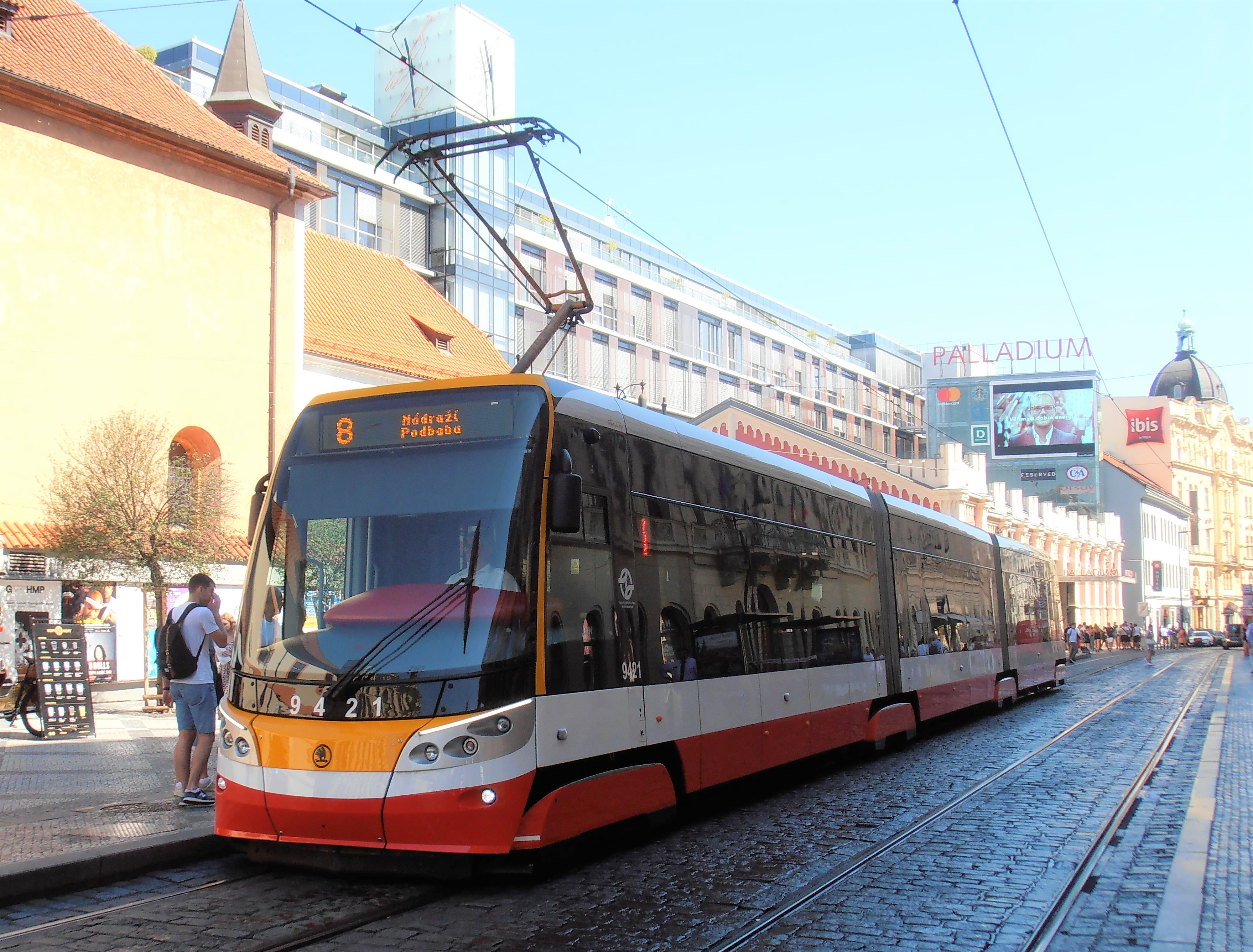 Tramwaj typu Škoda 15T4 ForCity na linii nr 8 w Pradze, 2018 r.